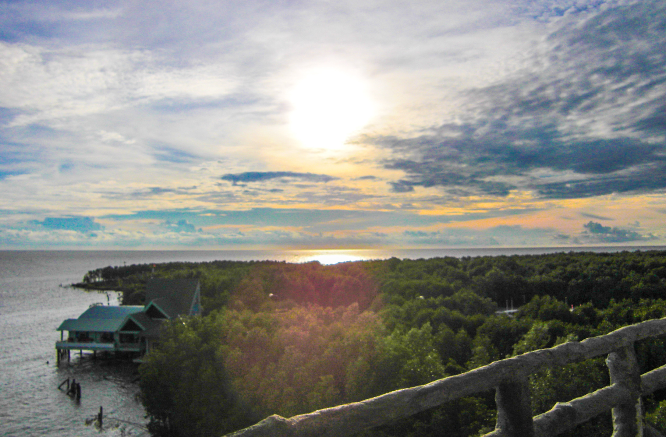 Mũi Cà Mau lúc hoàng hôn (Camau cape, Vietnam)